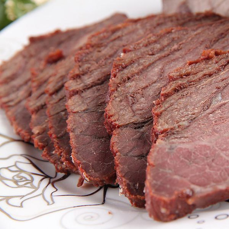 中文（中国大陆）: 河南滑县老爷庙乡特产-老庙牛肉